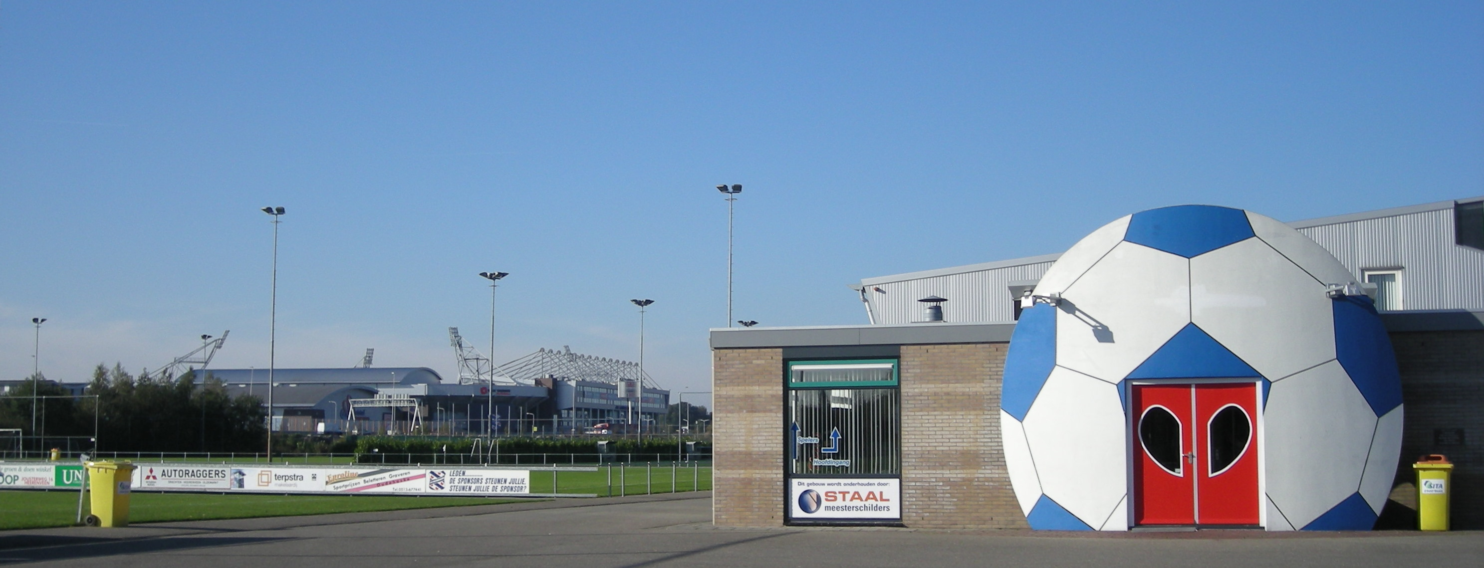 Sportpark Skoatterwâld in Heerenveen